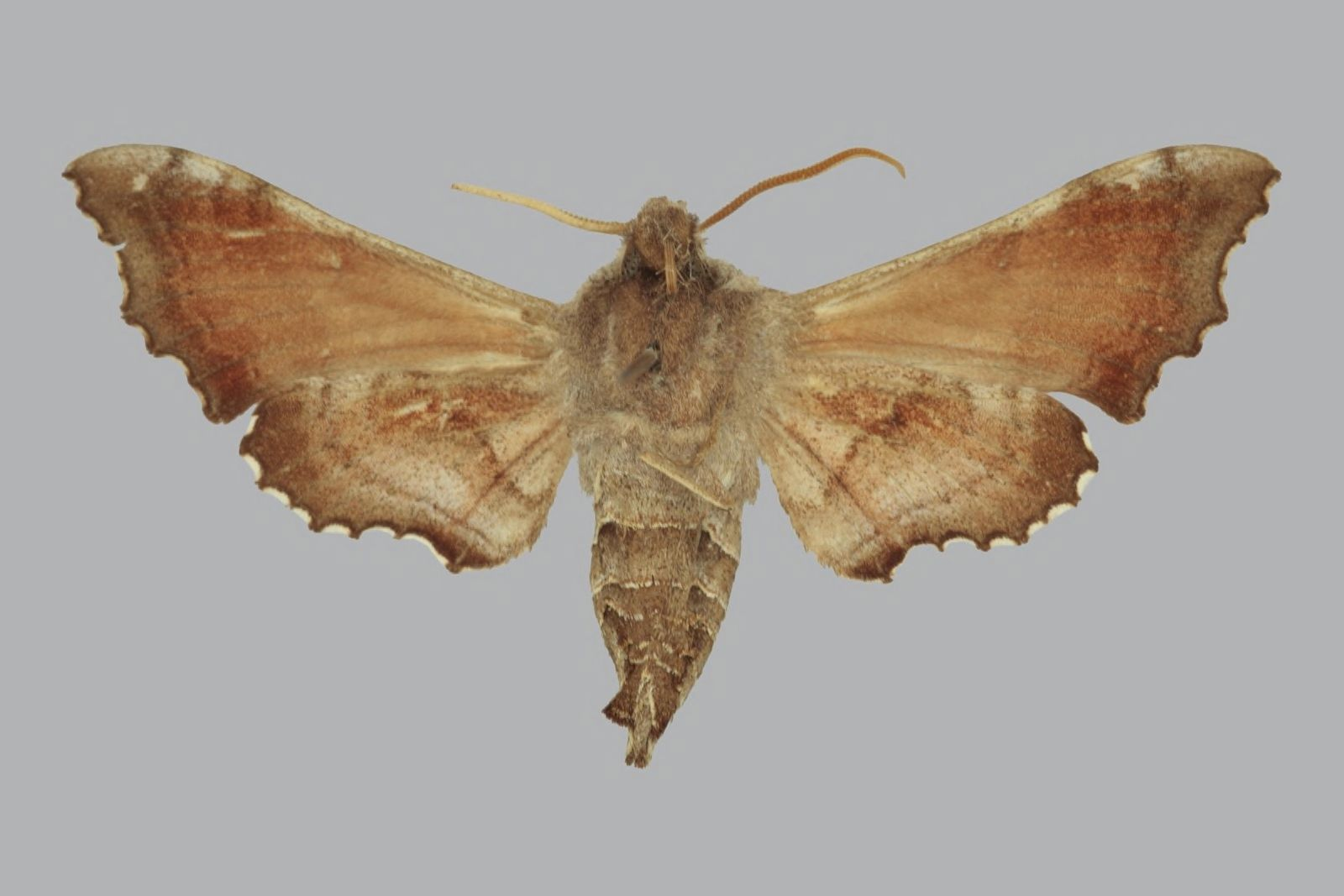 Odontosida pusillus, female, underside. South Africa, Natal, Mooi River